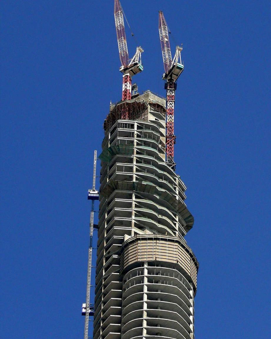 Foto del Burj Khalifa